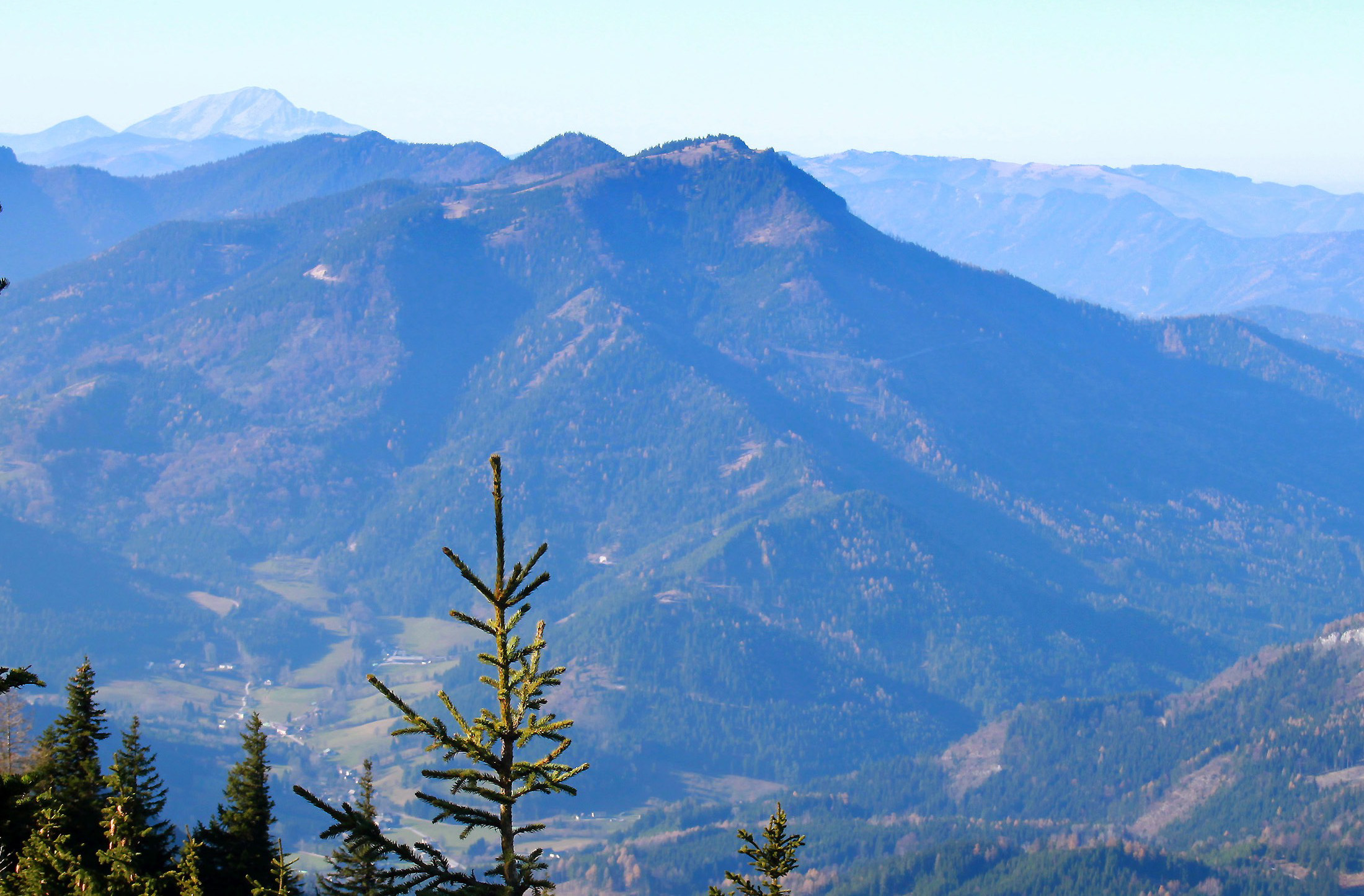 Obersberg von Ostsüdosten (Kuhschneeberg), links hinten der Ötscher